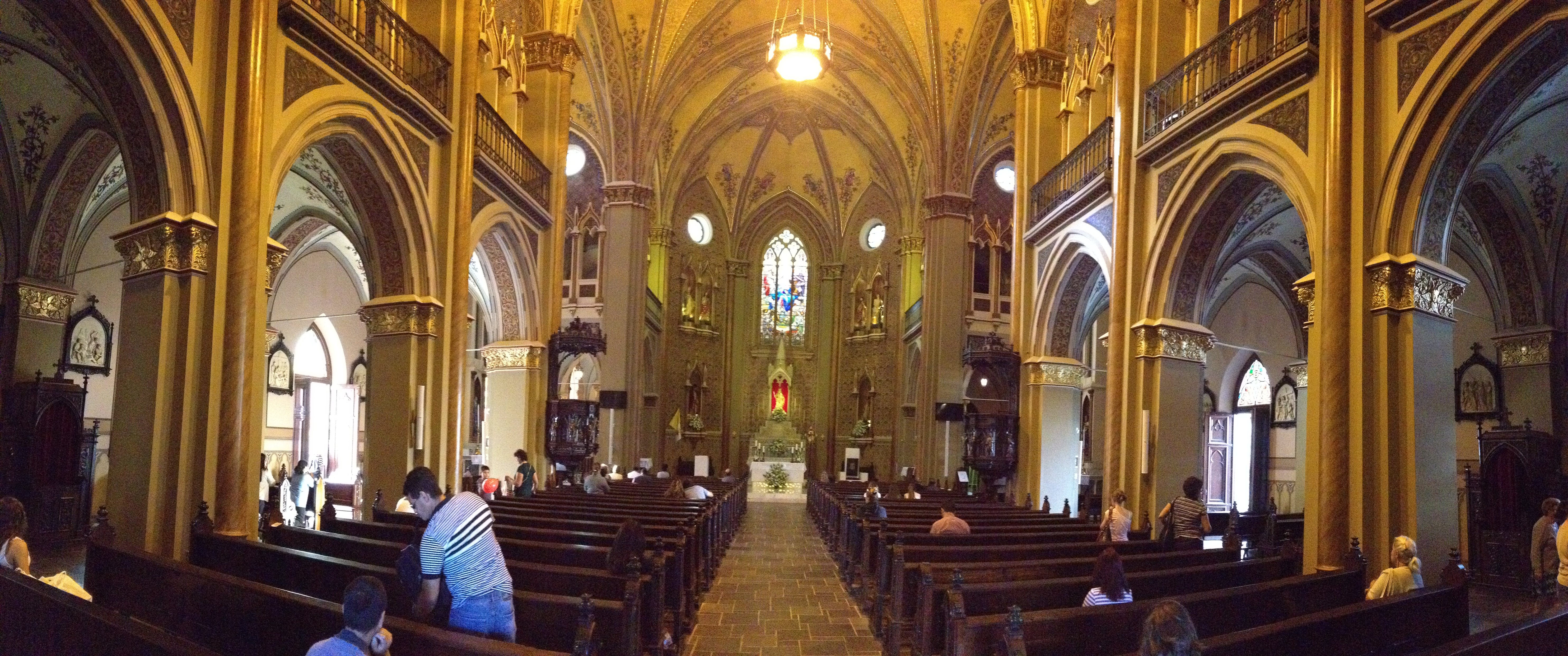 Catedral Basílica Nossa Senhora da Luz dos Pinhais (Interior) - Curitiba PR